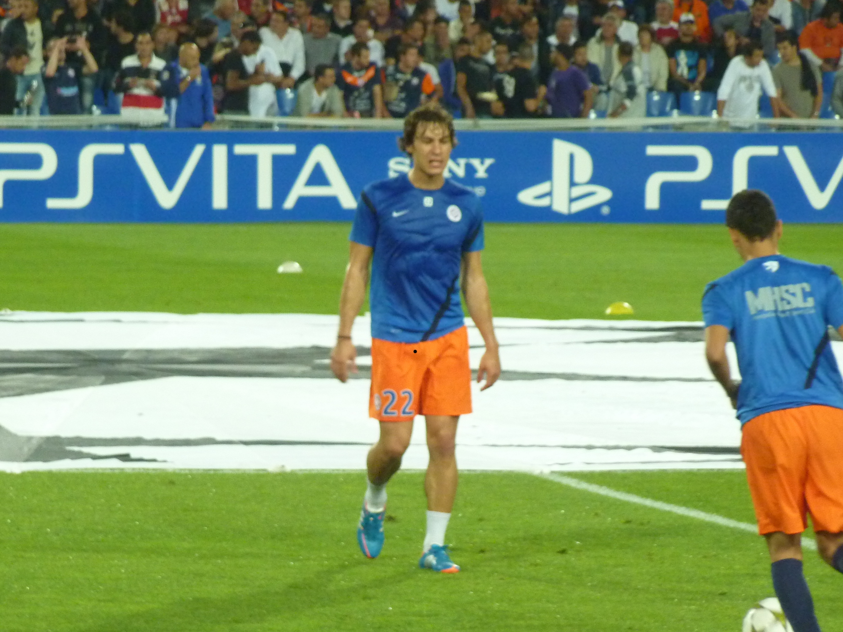 Benjamin Stambouli lors du match MHSC - Arsenal (Ligue des Champions, Phase de poules, 1er match, 18/09/2012)